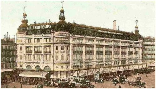 Photographie du magasin Printemps Haussmann dans les années 1900